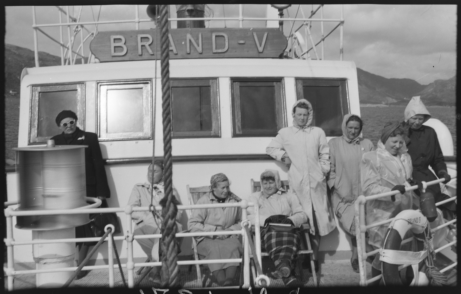 På tur med båten Brand V på 1950-tallet. Tora Kristensen sittende i midten.